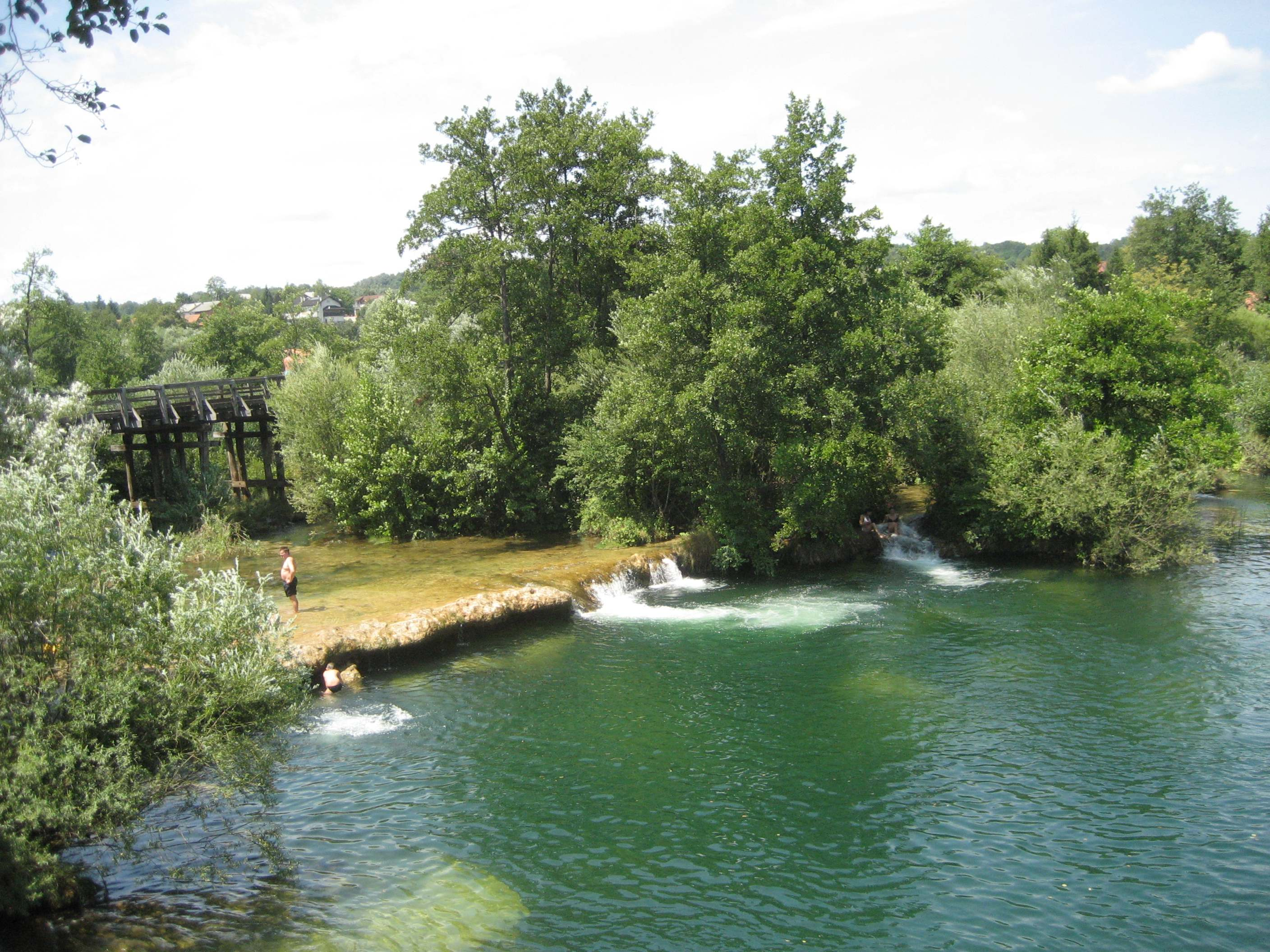 Mreznica River, Croatia